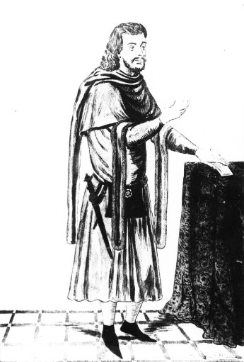 Eudes IV de Bourgogne